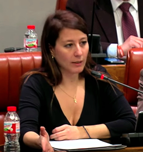 Sonia Sierra Infante el 2016, al ple ordinari a la Diputació de Barcelona el gener 2016.